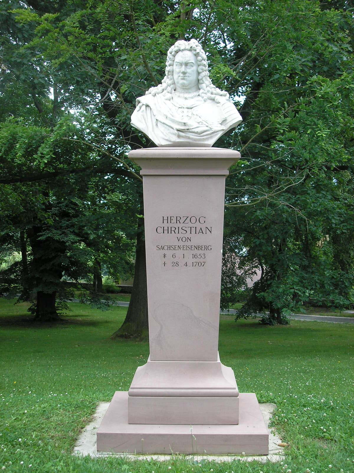 Denkmal zu Ehren von Christian von Sachsen-Eisenberg im Schlosspark in Eisenberg (Thüringen).